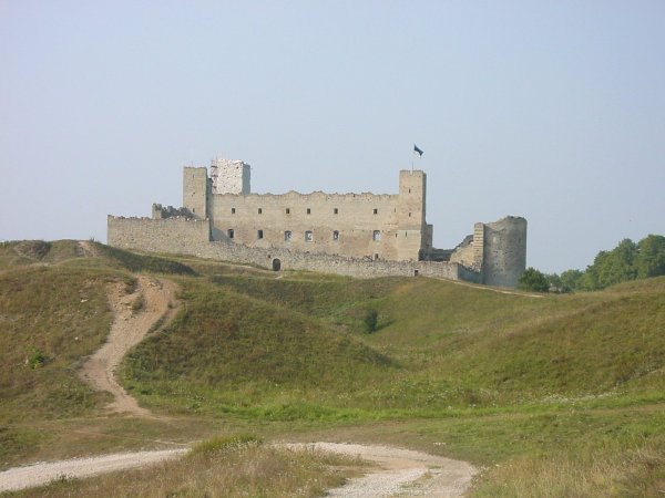 Burg Rakvere (Wesenberg)